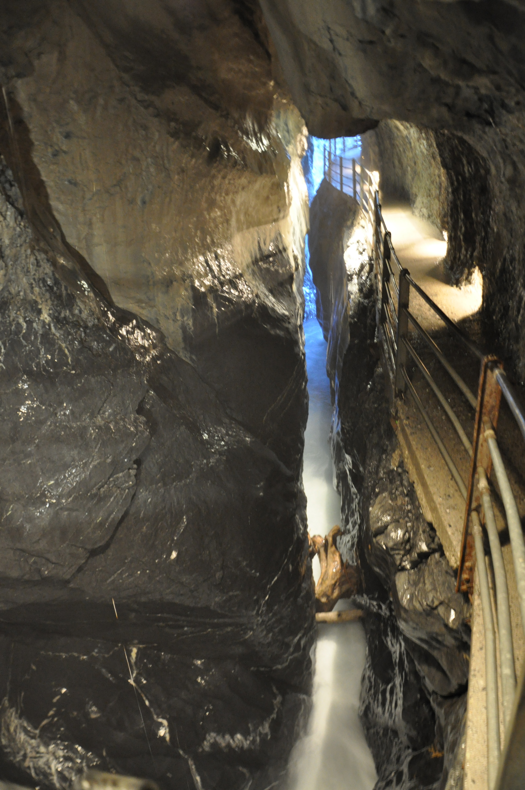 Switzerland, Canton of Bern, Trümmelbachfälle